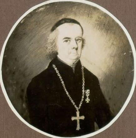 Franc Ksaver Kutnar (1793 - 1846), Slovene bishop.